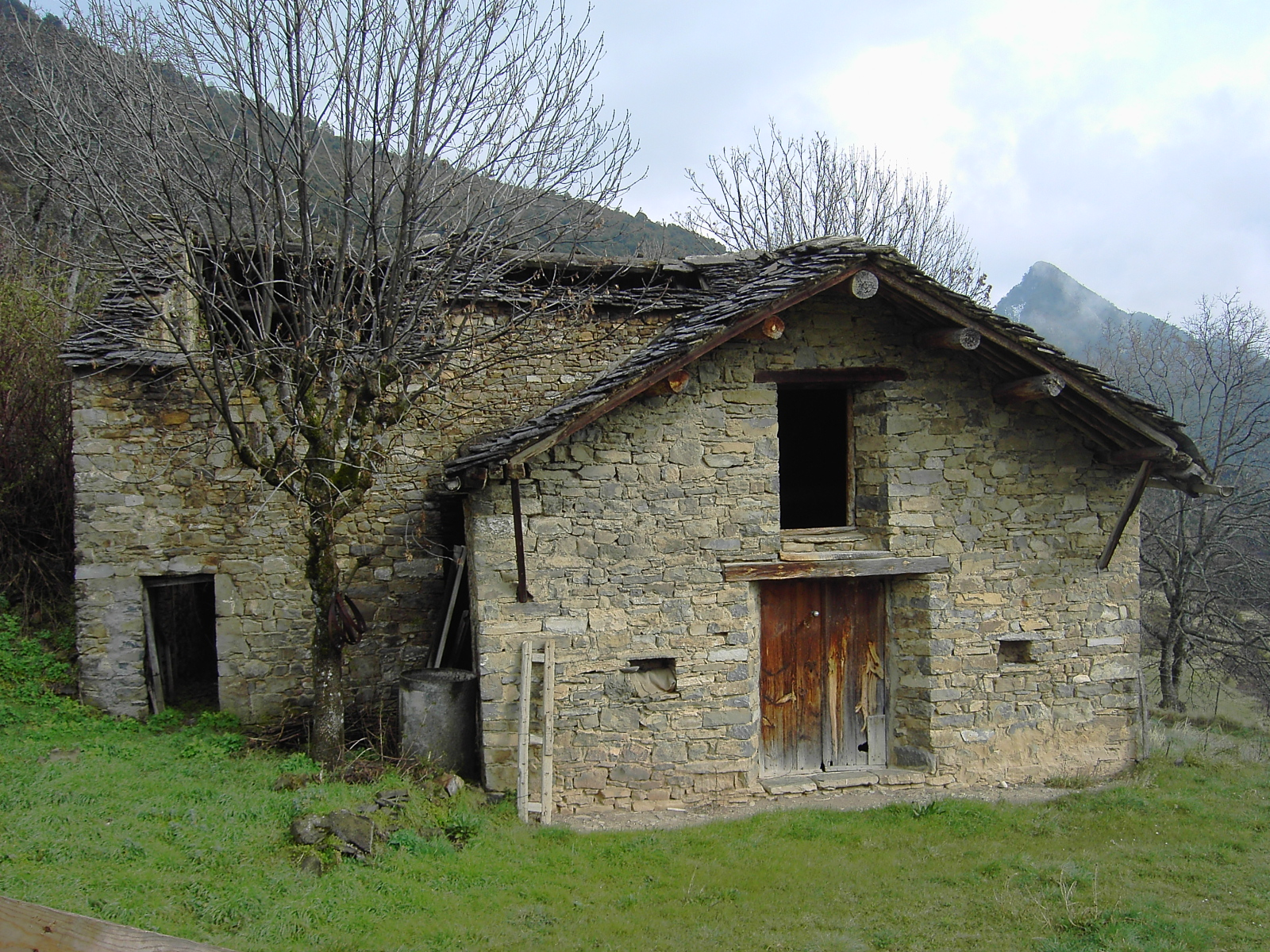 Unas bordas en la localidad oscense de Vió. Las bordas son las construcciones agrícolas típicas del pirineo.